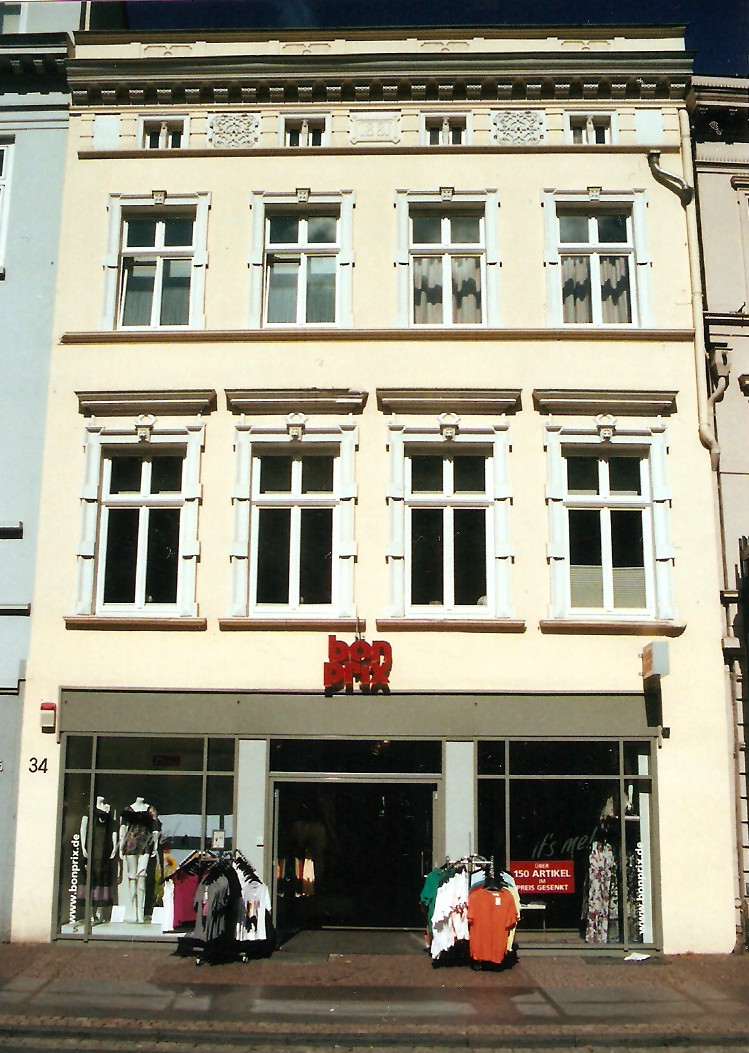 Wohnsitz von Christian Reuter